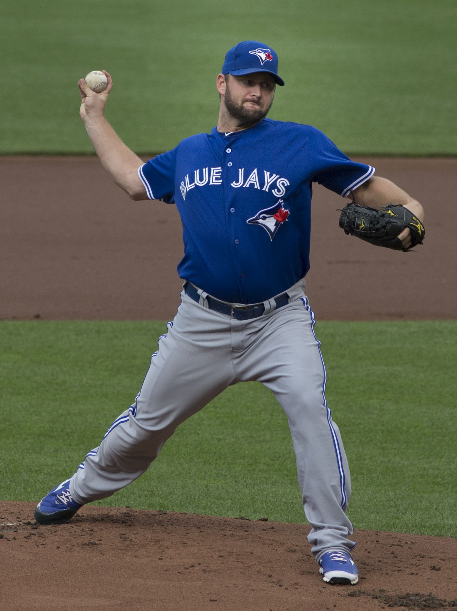 Todd Redmond